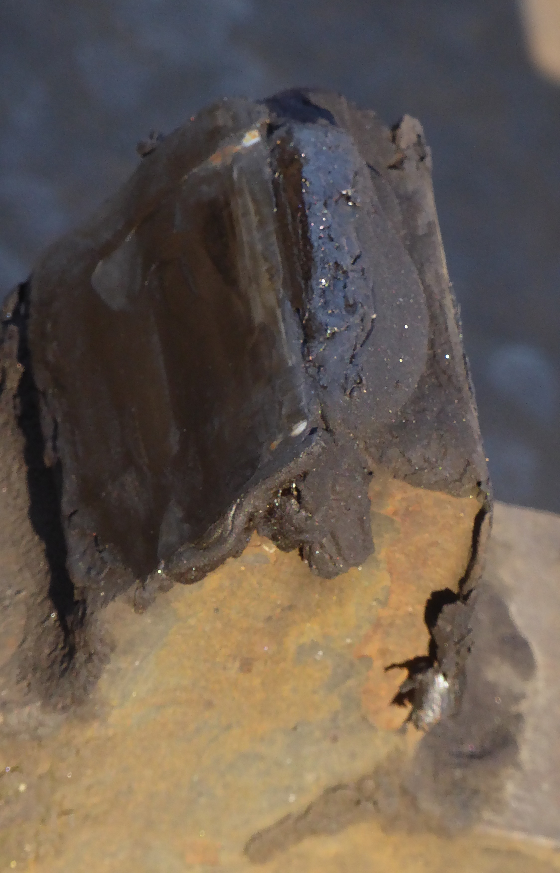 Fettablagerungen an der Von-Roll-Zahnstange der Appenzeller Bahnen (AB) in St. Gallen-Riethüsli